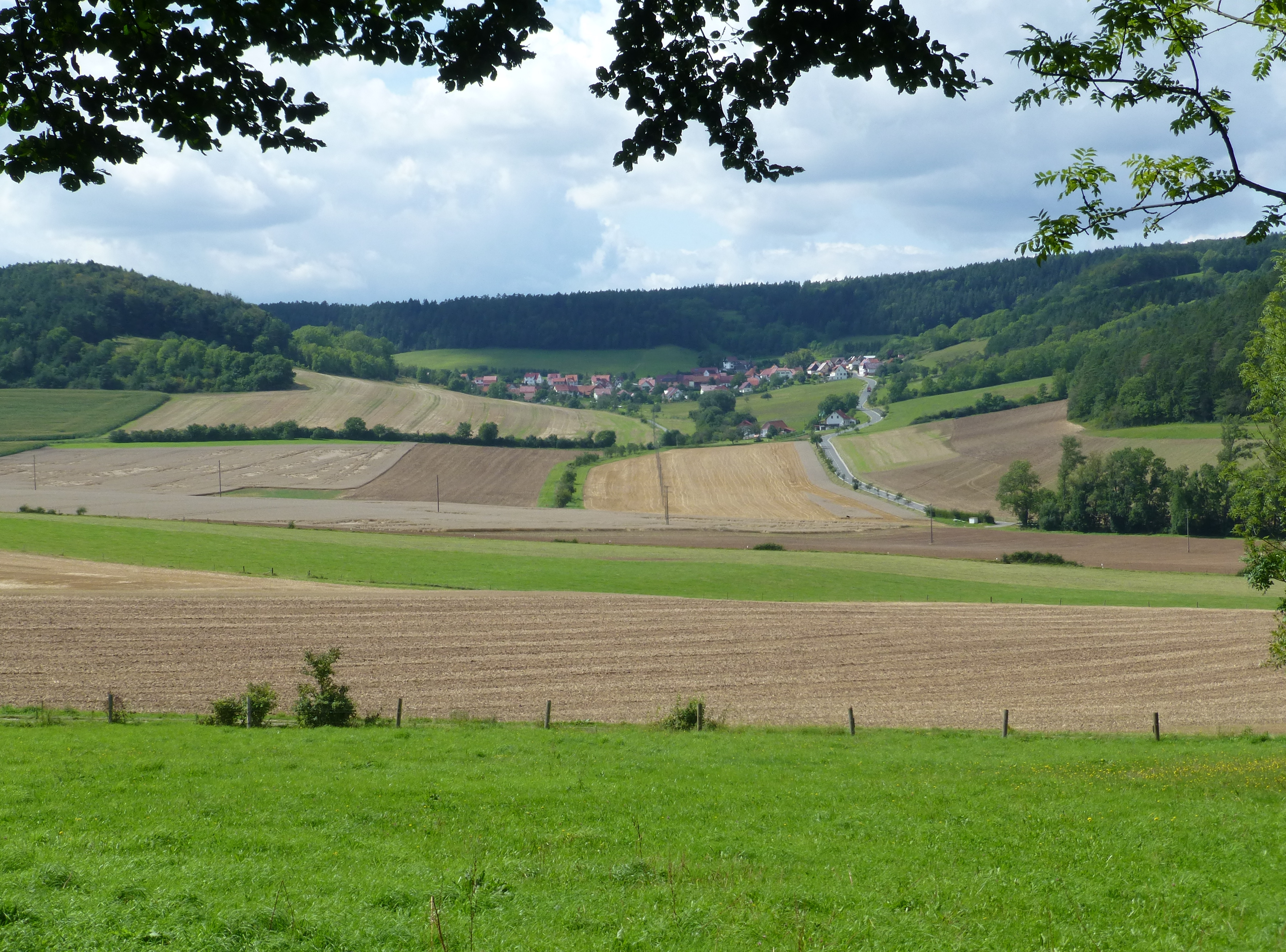 Blick auf Röhrig